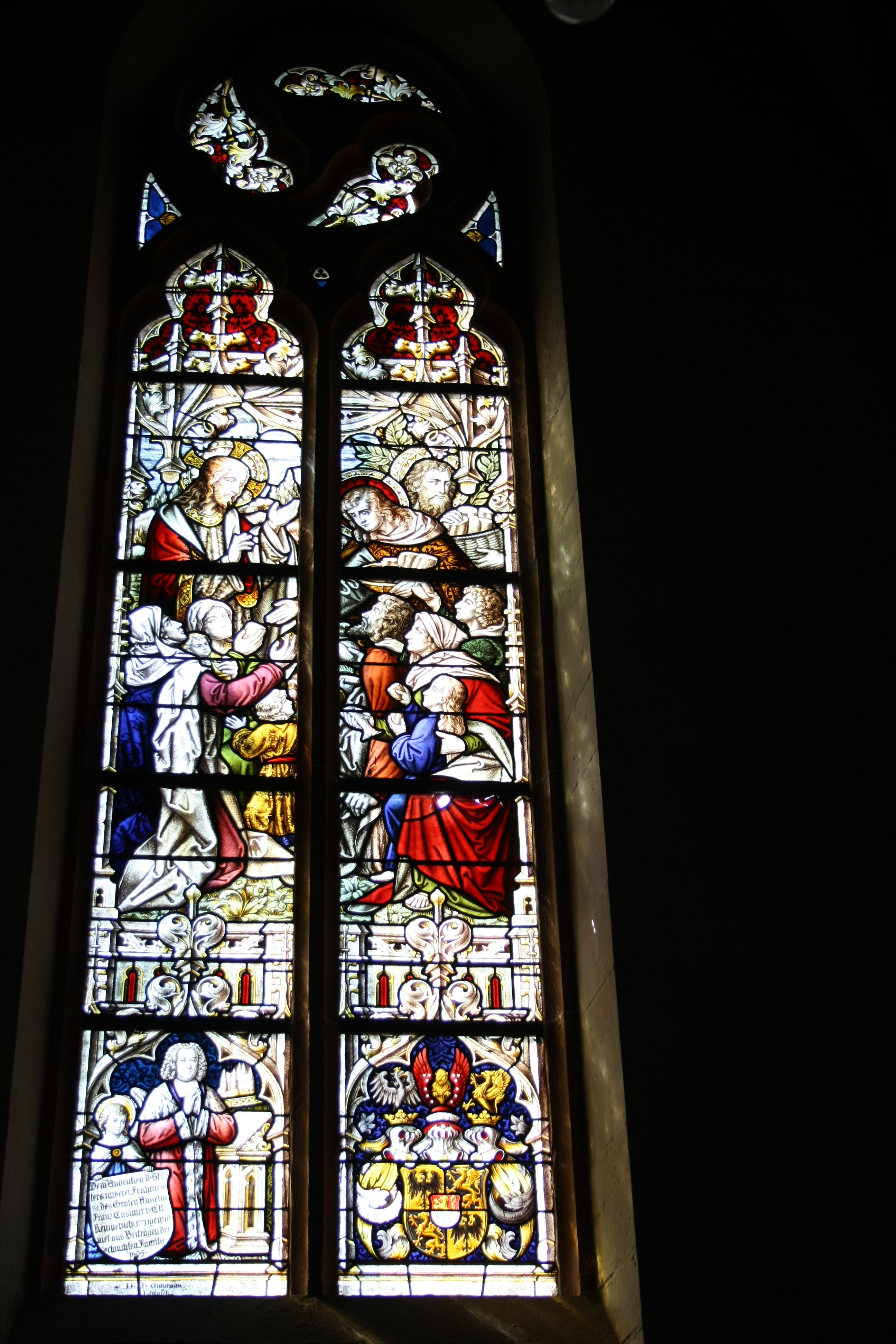 Bleiglasfenster in der katholischen Pfarrkirche St.Philippus und Jakobus in Kempenich, Darstellung: Jesus und die Kinder